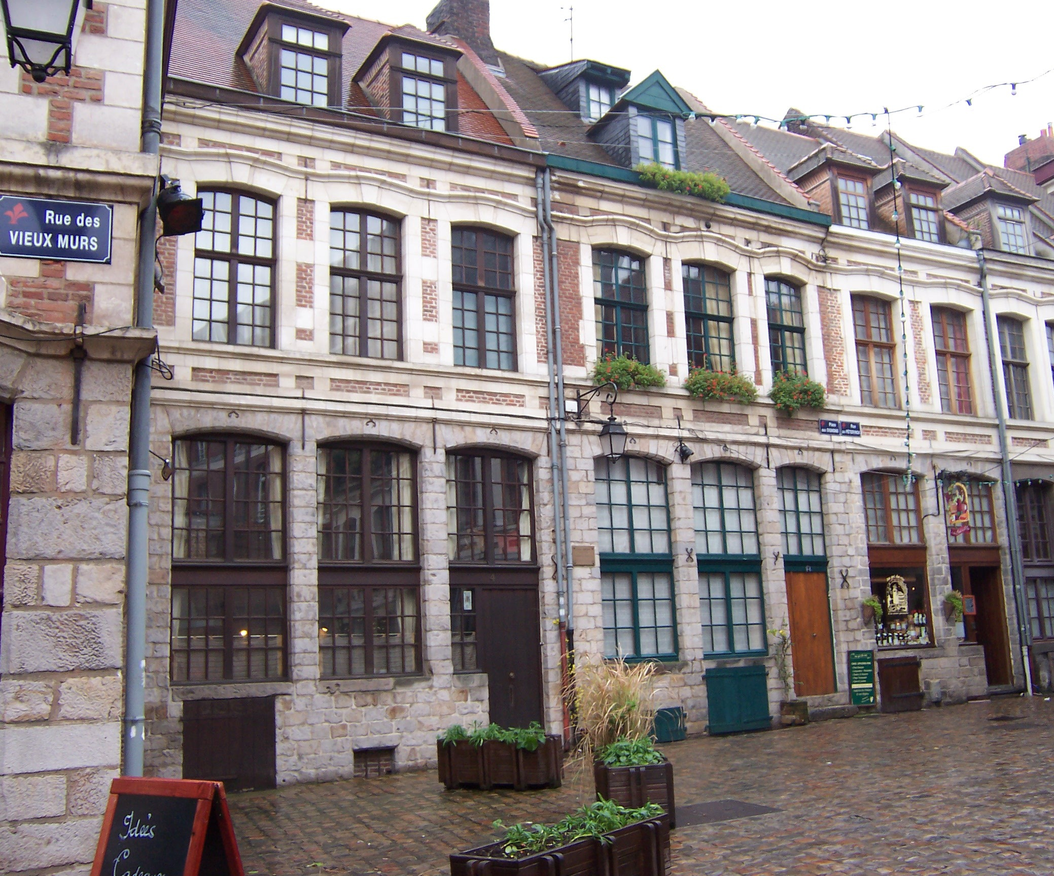 the Place aux oignons, in Lille (France)